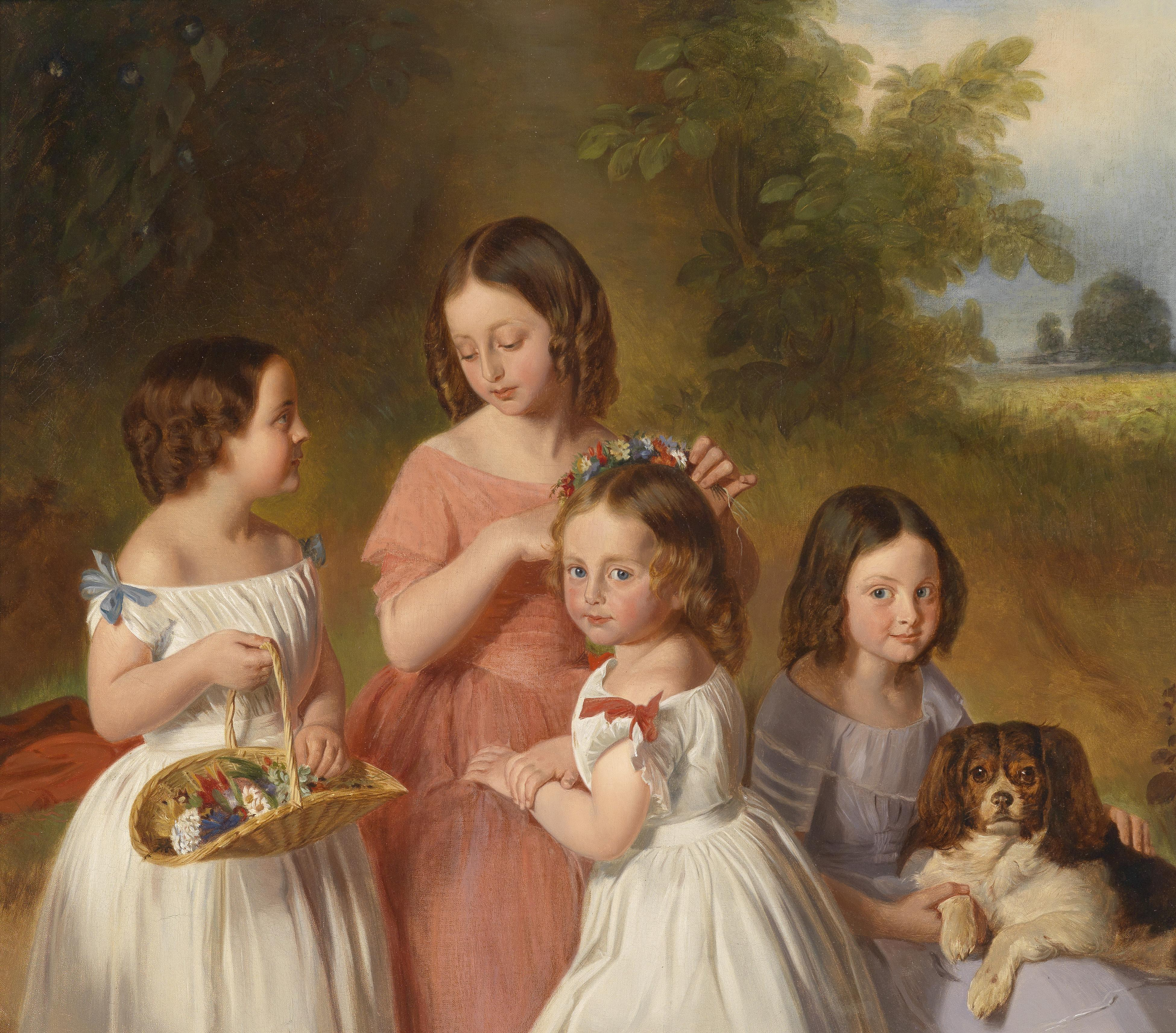 Geschwister, rückseitig altes Klebeetikett mit Betitelung, bezeichnet, datiert Dietler 1846, Öl auf Leinwand, 63 x 73,5 cm